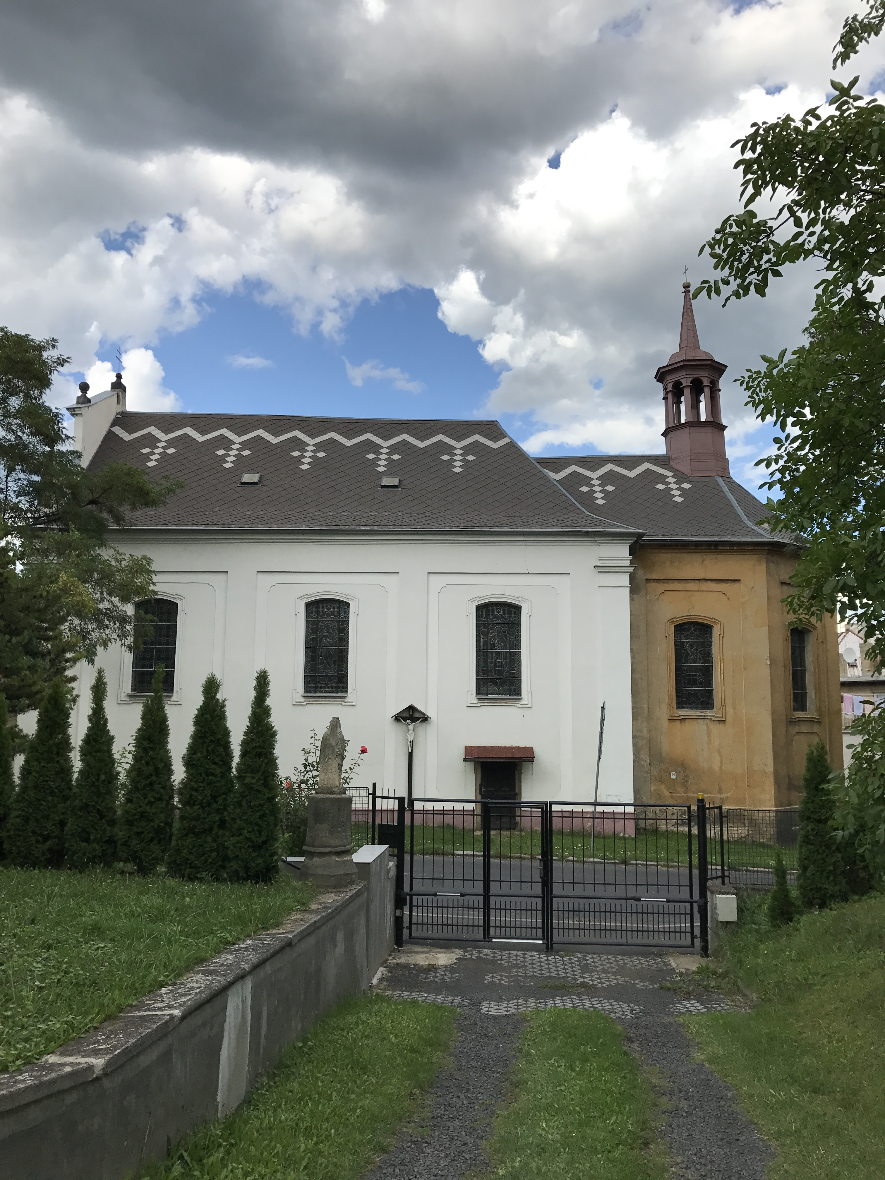 Kostel sv. Valentina v Novosedlicích